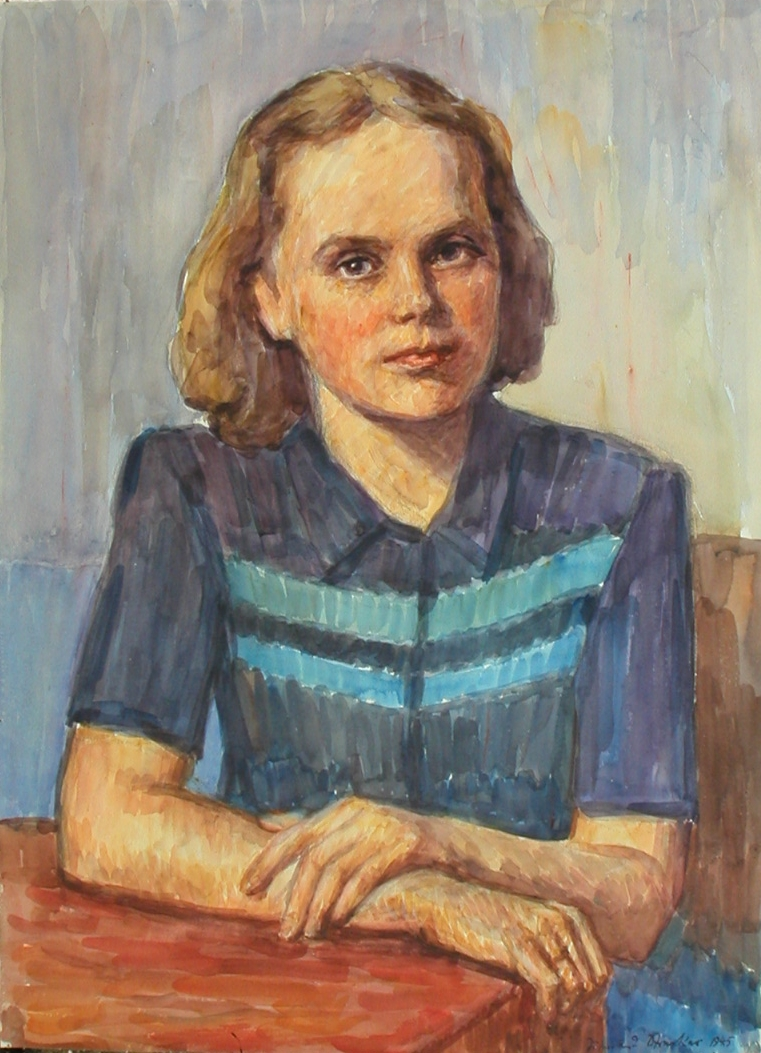 Gemälde von Sigmund Strecker: Portrait von Elisabeth Malsch, 1945